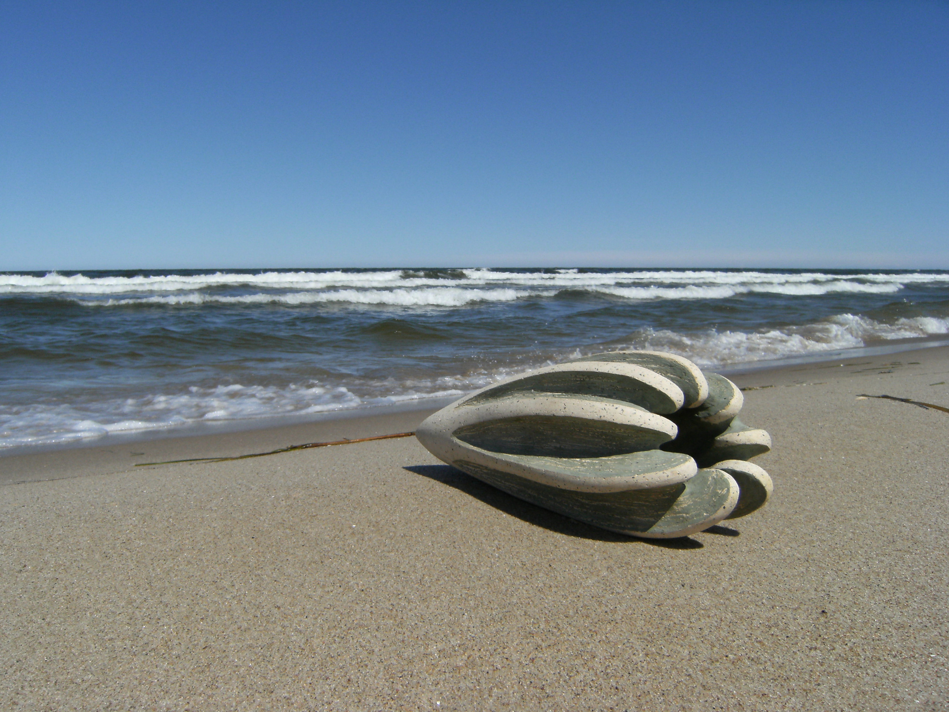 Ceramika artystyczna, autorka Krystyna Andrzejewska-Marek.